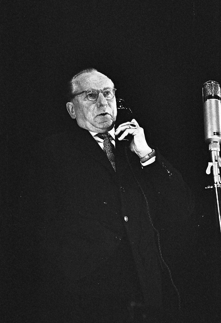 Freiburg: Stadthalle; Die Insulaner; Bruno Fritz als „Kummer“